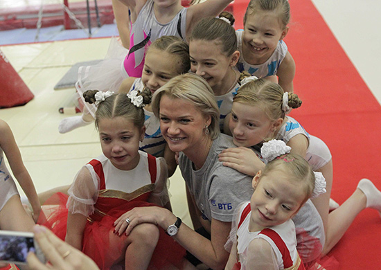 Открытый мастер-класс для юных спортсменов ЦСКА